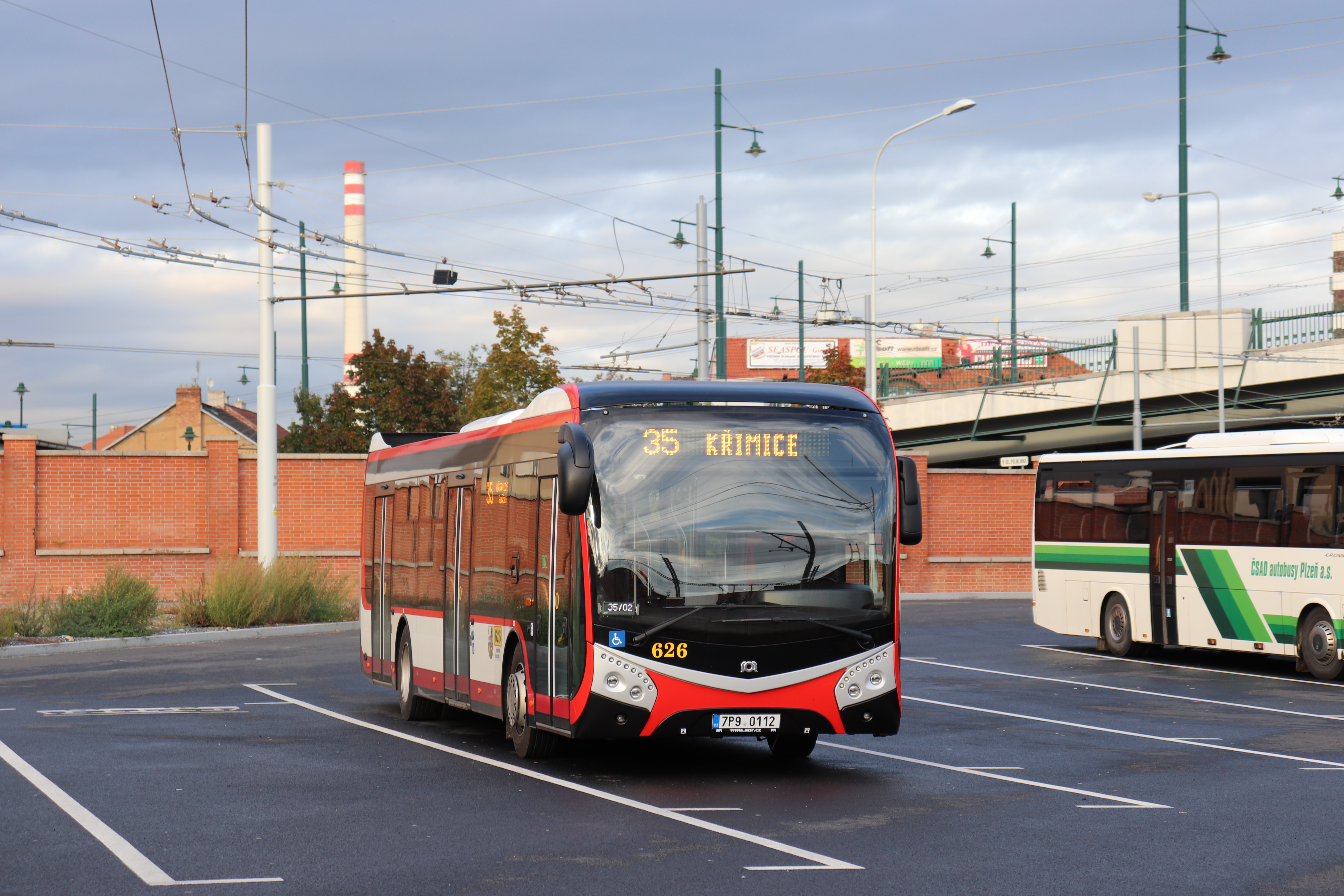 Nový autobus SOR NS12 dopravce PMDP